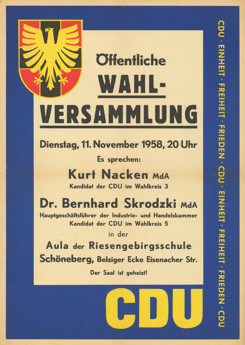 Öffentliche Wahl- Versammlung ... Es sprechen: Kurt Nacken MdA Kandidat der CDU im Wahlkreis 3 Dr. Bernhard Skrodzki MdA Hauptgeschäftsführer der Industrie- und Handelskammer Kandidat der CDU im Wahlkreis 5 ... Der Saal ist geheizt! CDU CDU . Einheit . Freiheit . Frieden . CDU . Einheit ...Plakatart:AnkündigungsplakatAuftraggeber:CDU-BundesgeschäftsstelleDrucker_Druckart_Druckort:KVD, KölnObjekt-Signatur:10-004 : 208Bestand:Plakate zu Abgeordnetenhauswahlen Berlin (10-004)GliederungBestand10-18:Plakate zu Abgeordnetenhauswahlen Berlin (10-004) » CDULizenz:KAS/ACDP 10-004 : 208 CC-BY-SA 3.0 DE